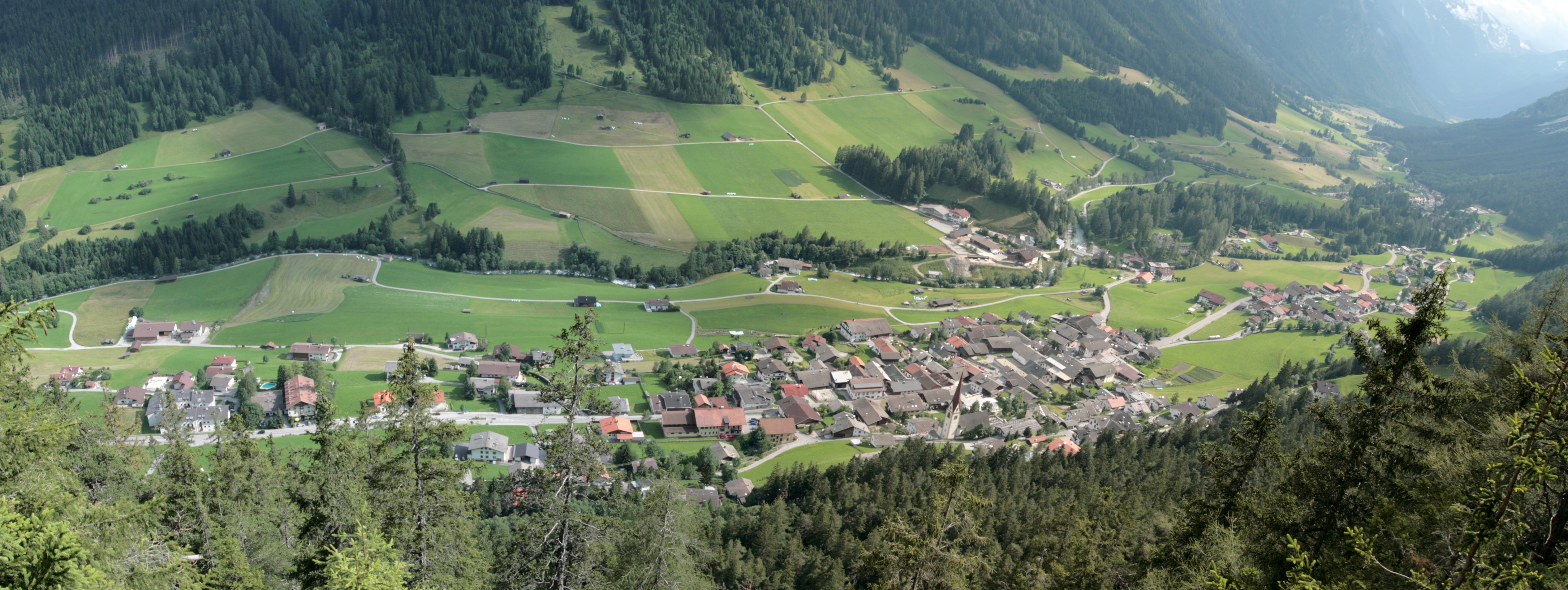 Blick auf Trins von Norden